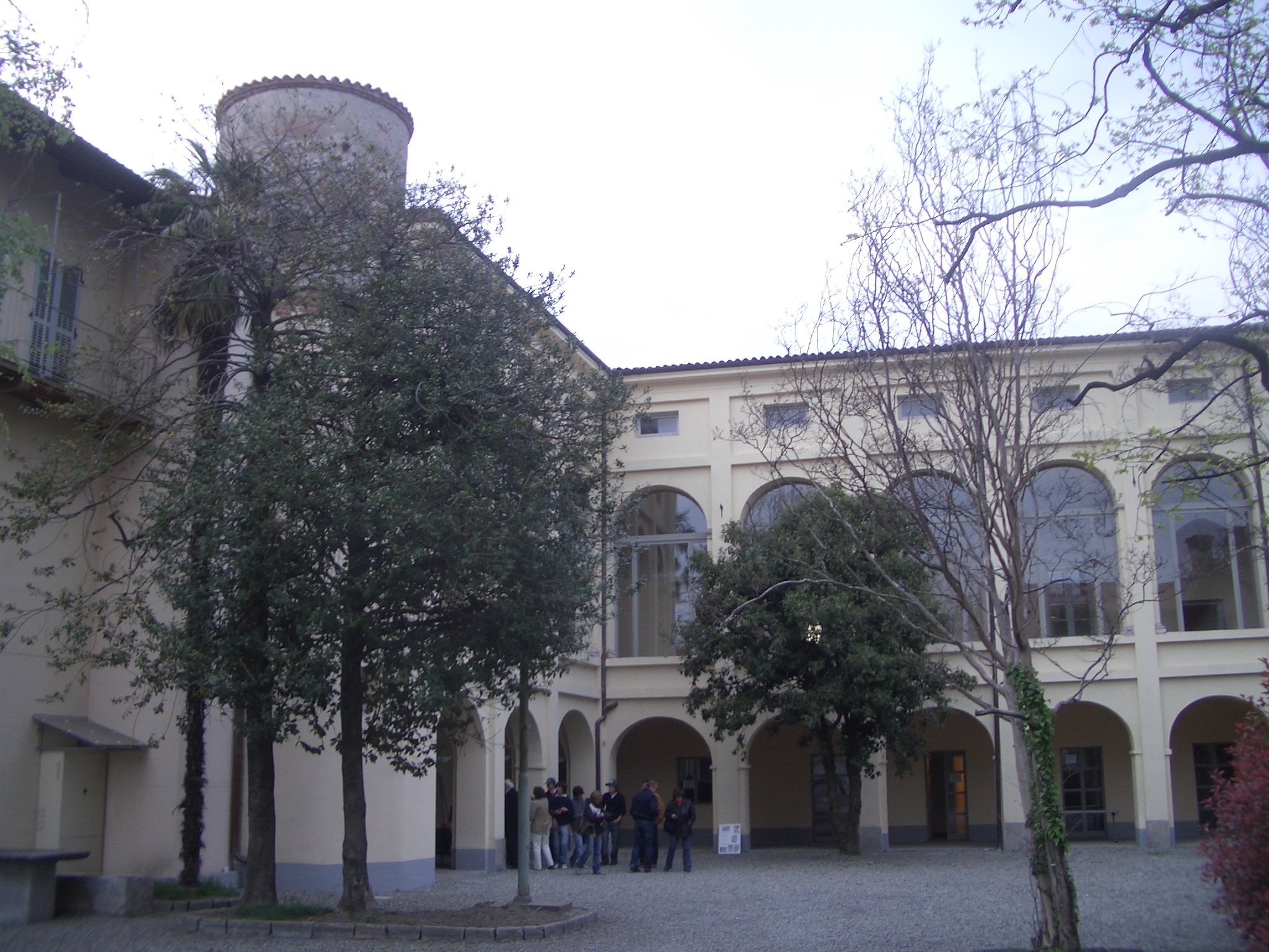 Borgofranco d'Ivrea, Palazzo Marini, XVII century